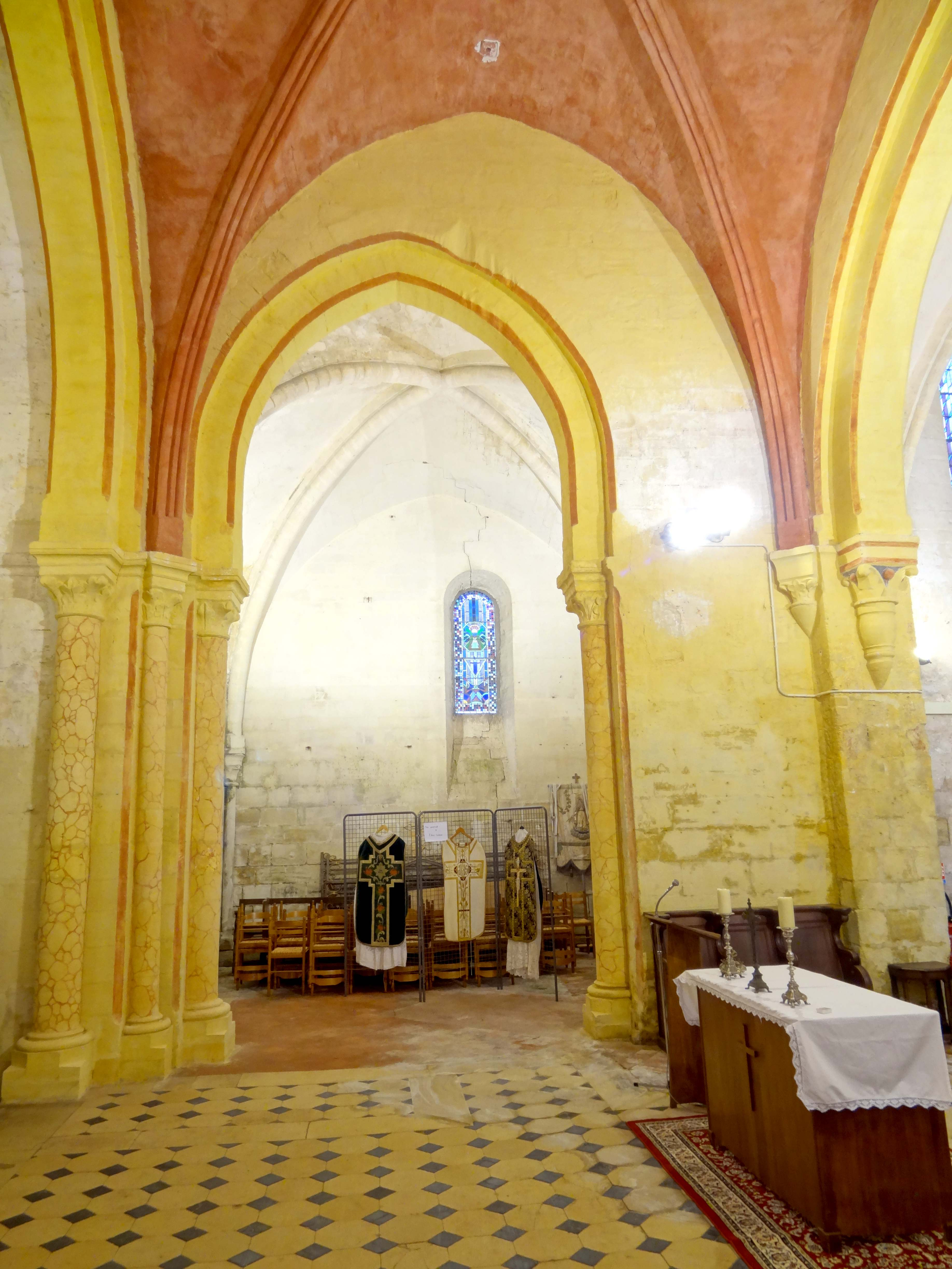 Intérieur de l'église - voir titre.